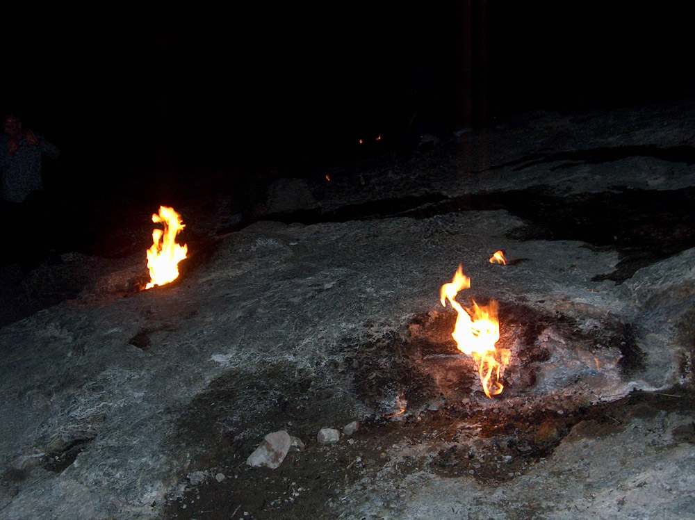 Fires of Chimera, Çıralı, Turkey.